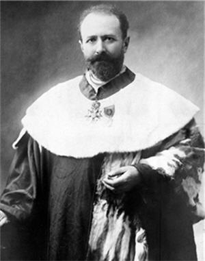 Procureur Baudouin - affaire dreyfus